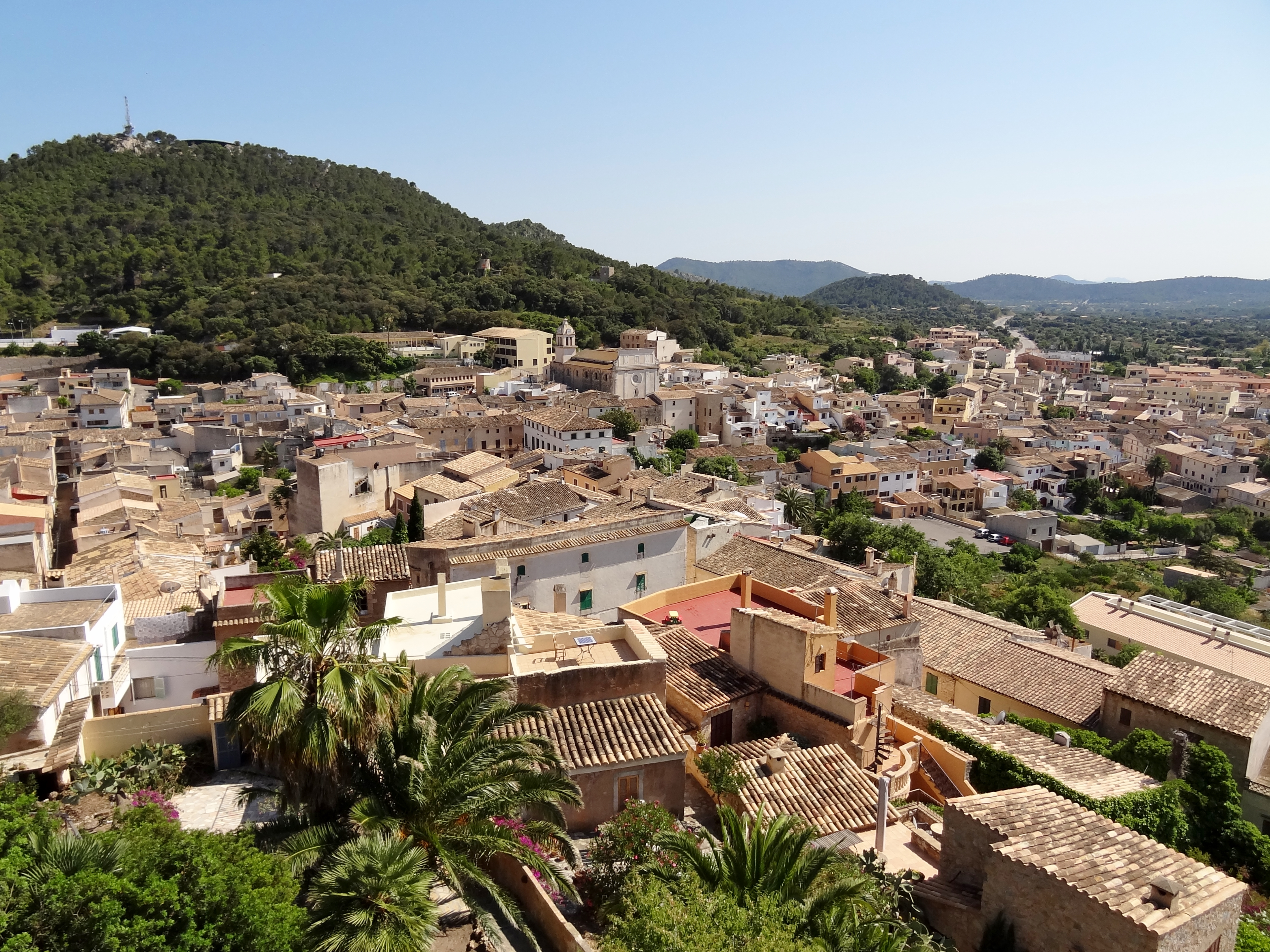 Blick vom Castell de Capdepera, Gemeinde Capdepera, Mallorca, Spanien